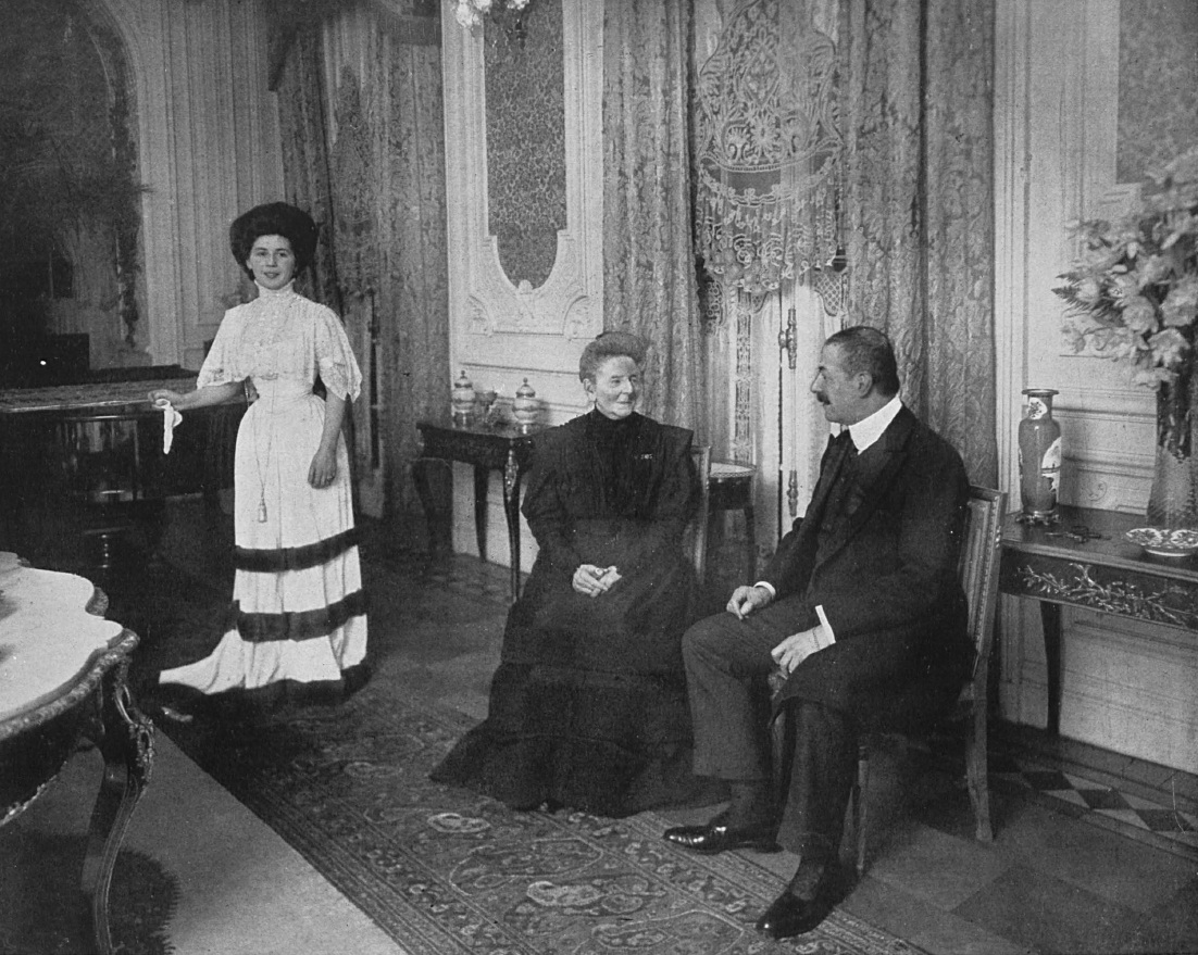 James von Bleichröder (1859-1937), deutscher Bankier jüdischer Herkunft mit seiner Ehefrau Harriet von Bleichröder (links) und der Gesangslehrerin Mathilde de Castrone-Marchesi (aus Paris) in seiner Berliner Wohnung, 1908.